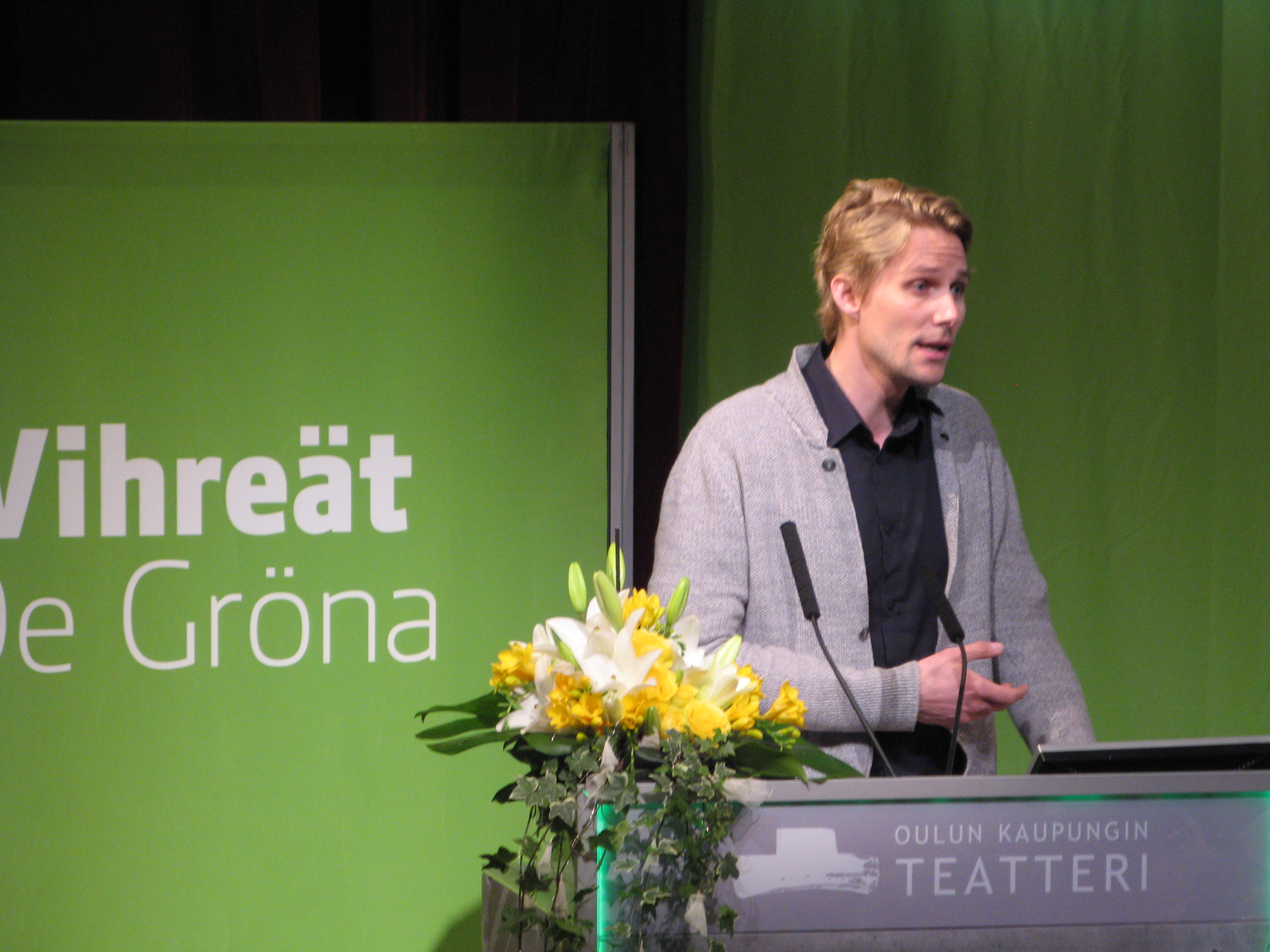 Antero Vartia